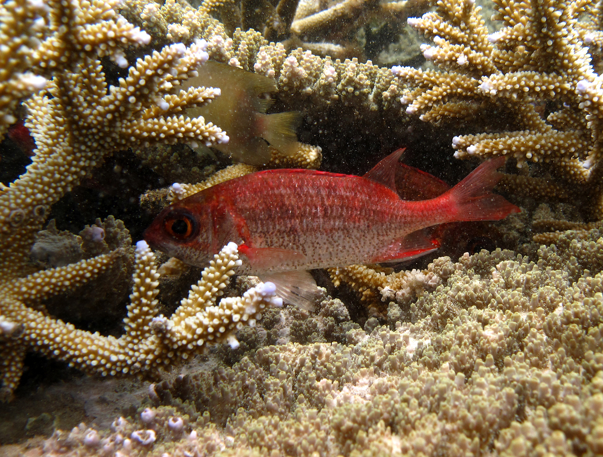 Un écureuil tacheté (Sargocentron punctatissimum) à la Réunion.